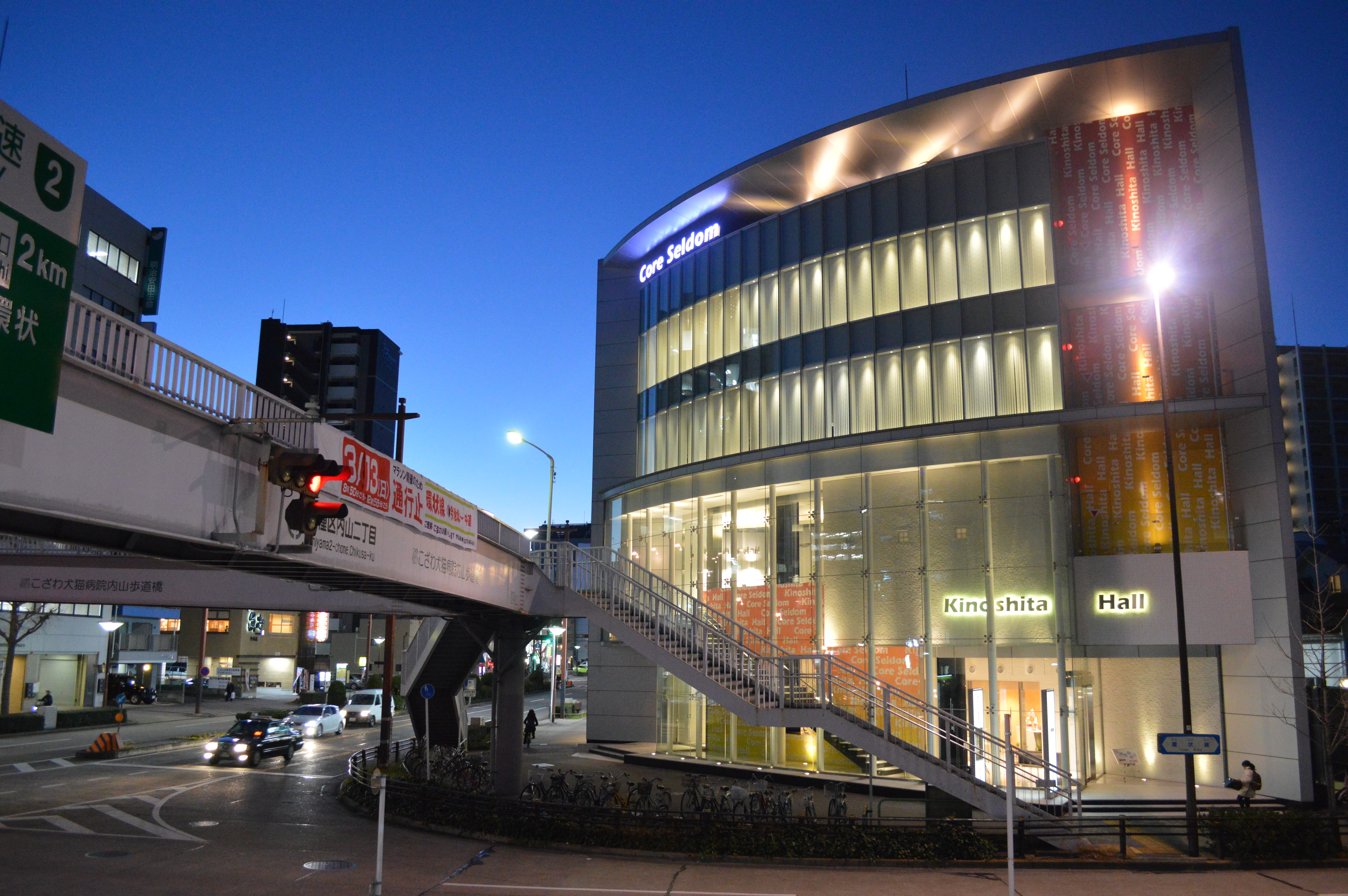 キノシタホールなどが入居する複合ビル、Core Seldom、愛知県名古屋市千種区